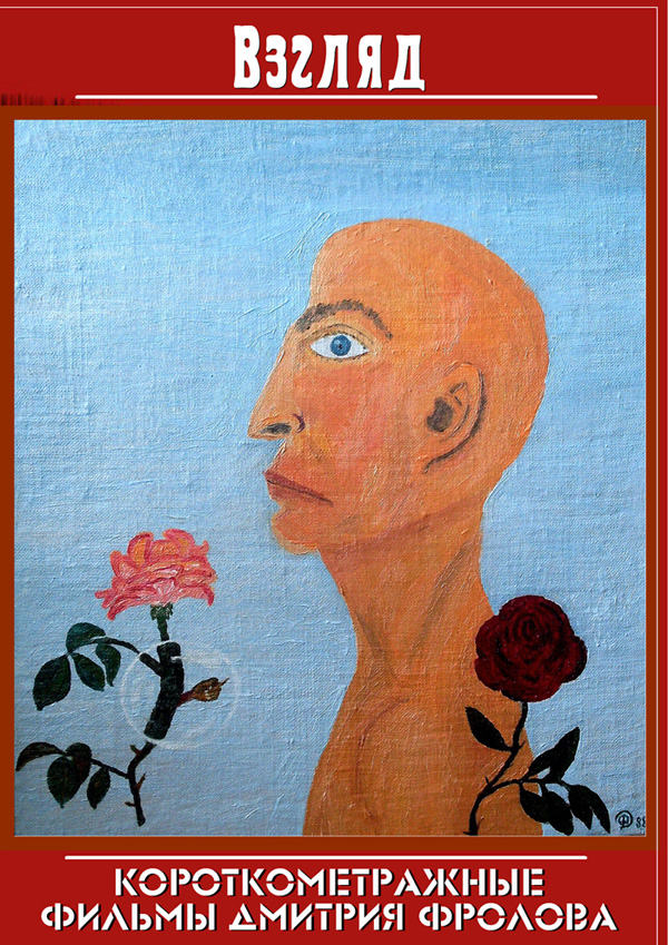 Обложка DVD сборника фильмов Дмитрия Фролова. За основу взята картина Дмитрия Фролова "Портрет"